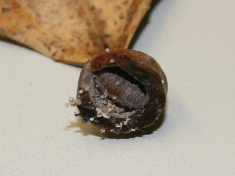 Schwebfliegenlarve im Herbst in Galle von Pemphigus spirothecae gefunden